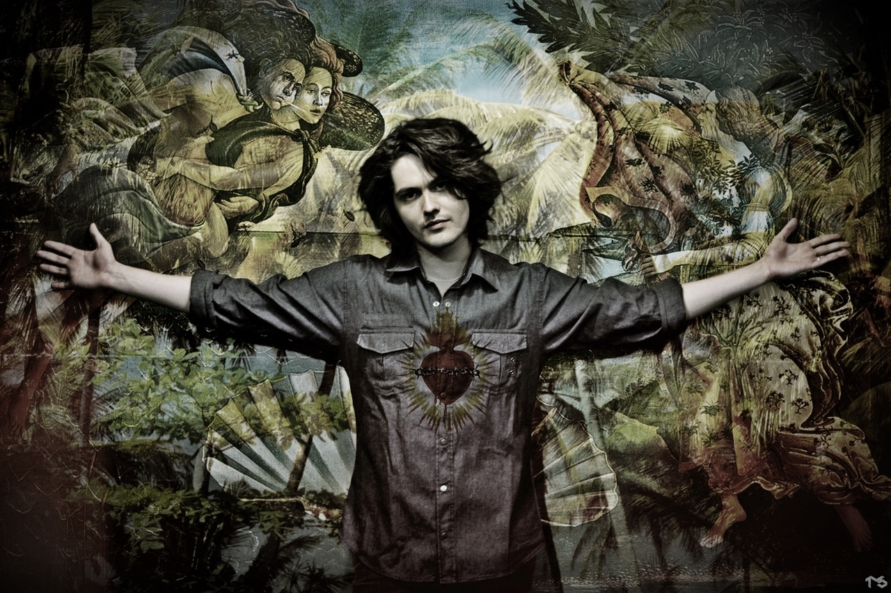 Filipe Catto Alves, (Lajeado, 26 de setembro de 1987) é um cantor, compositor, pianista e violonista brasileiro de MPB[